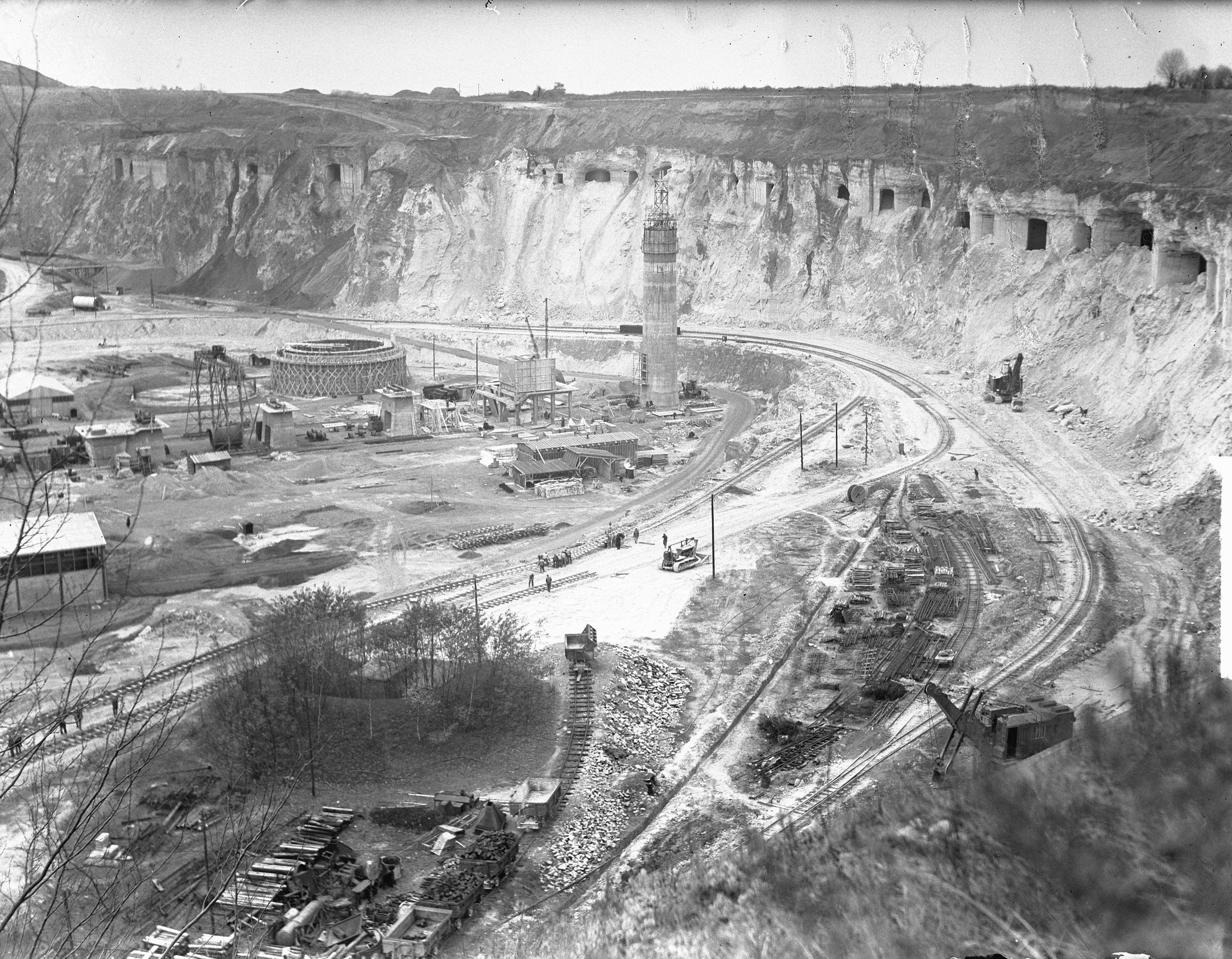 Collectie / Archief : Fotocollectie Anefo Reportage / Serie : [ onbekend ] Beschrijving : Mergelgroeve ENCI. Sint Pietersberg te Maastricht. In de wand van de groeve zijn de gangen van het Zuidelijk gangenstelsel zichtbaar. Opnamerichting west. Kilometervak RD 176-314. Datum : 8 november 1950 Locatie : Limburg, Maastricht, Sint Pietersberg Trefwoorden : afgravingen, mergelgroeven Persoonsnaam : ENCI Fotograaf : Oorschot, […] van / Anefo Auteursrechthebbende : Nationaal Archief Materiaalsoort : Glasnegatief Nummer archiefinventaris : bekijk toegang 2.24.01.09 Bestanddeelnummer : 904-2852